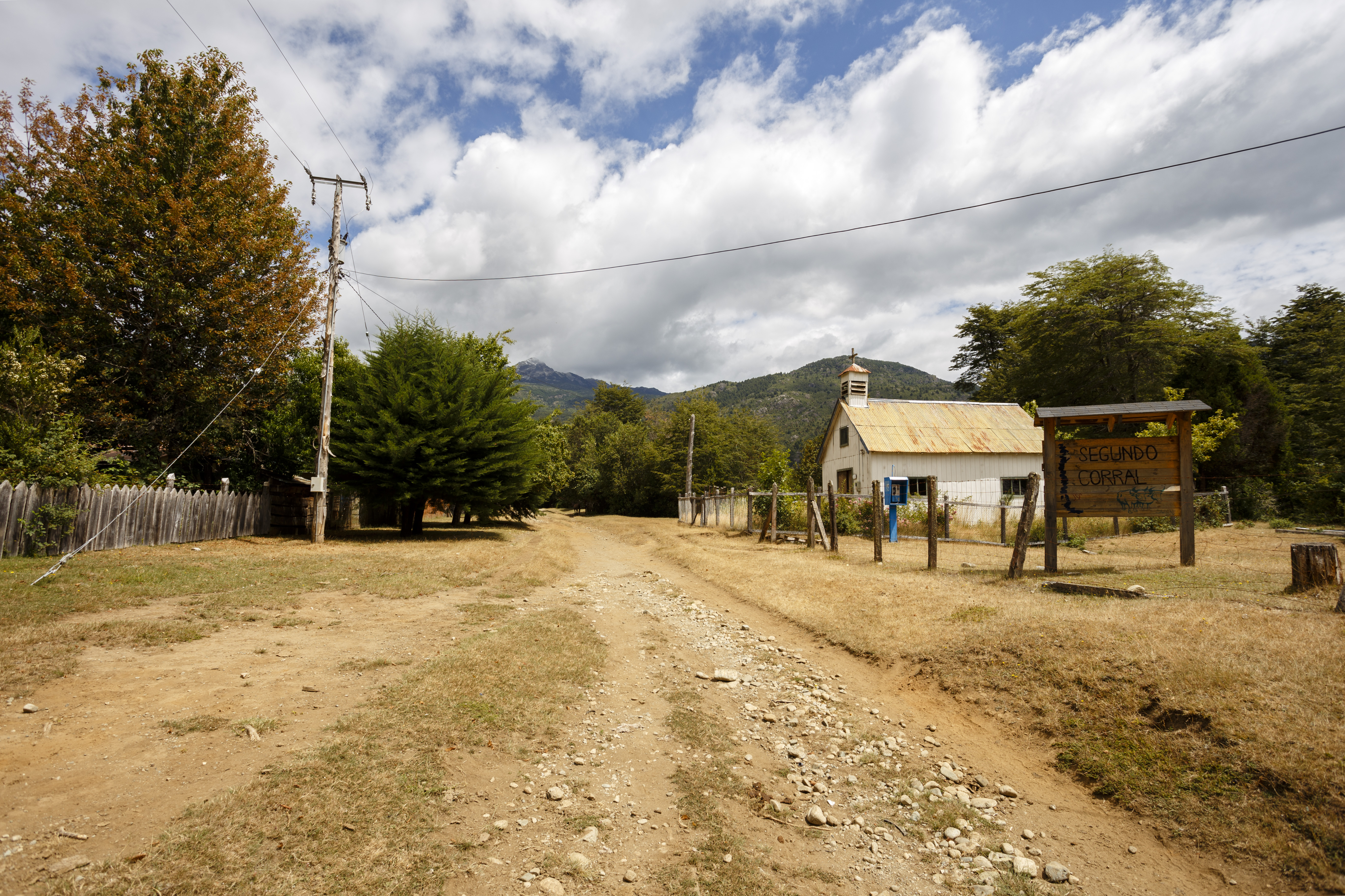 Localidad de Segundo Corral, valle del Puelo, Cochamó. Chile.